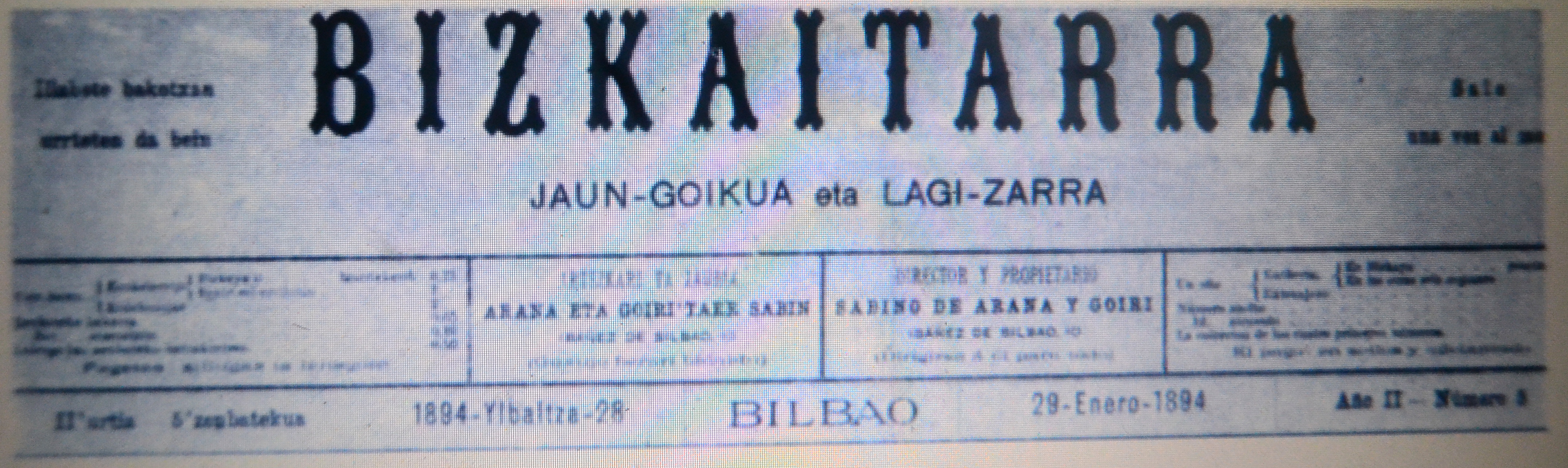 1894ko urtarrileko Bizkaitarra euskal aldizkari abertzalearen alea. - Bizkaitarra basque nationalism magazine. Number of January, 1894.